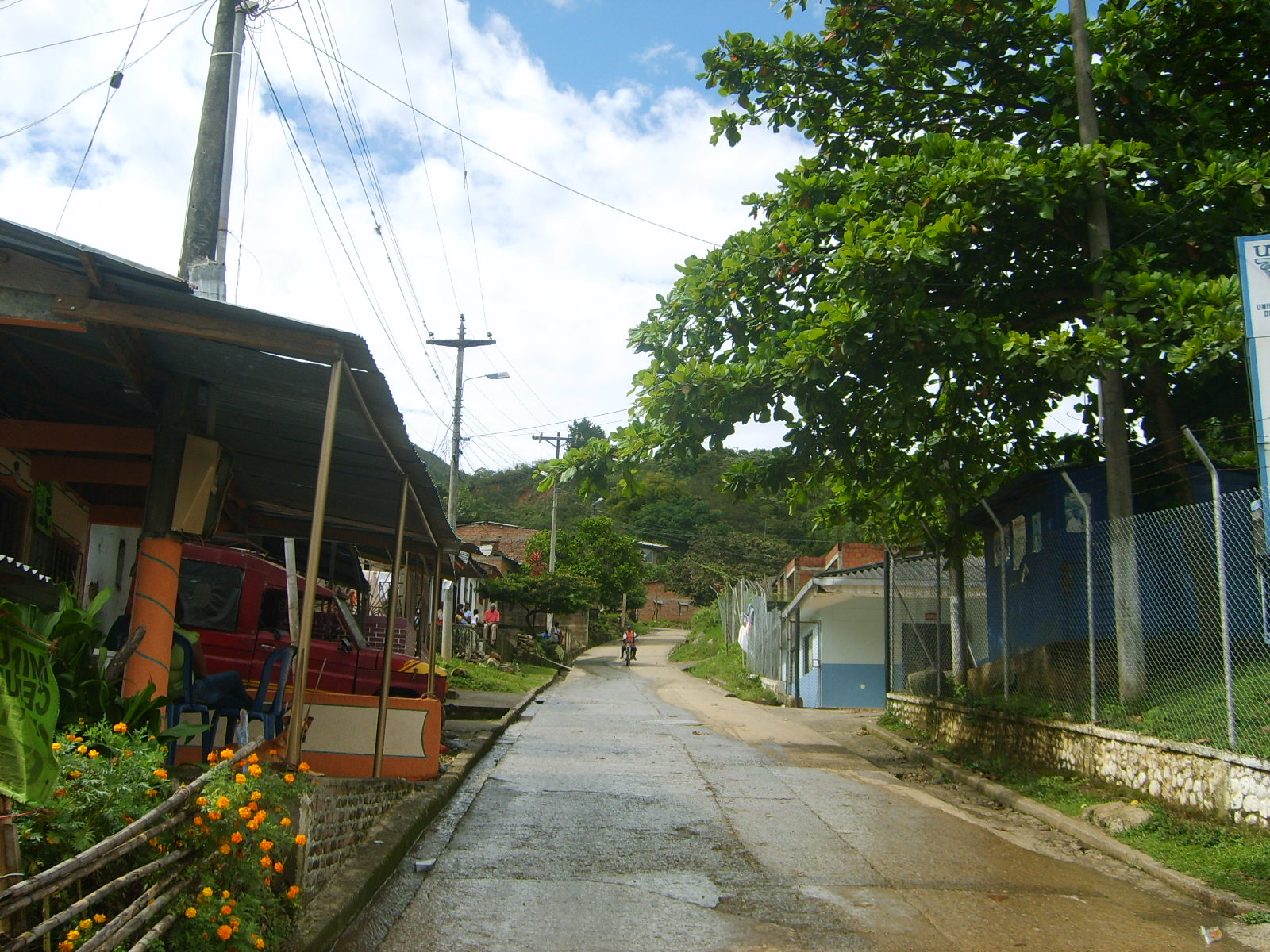 calle de Suárez Cauca